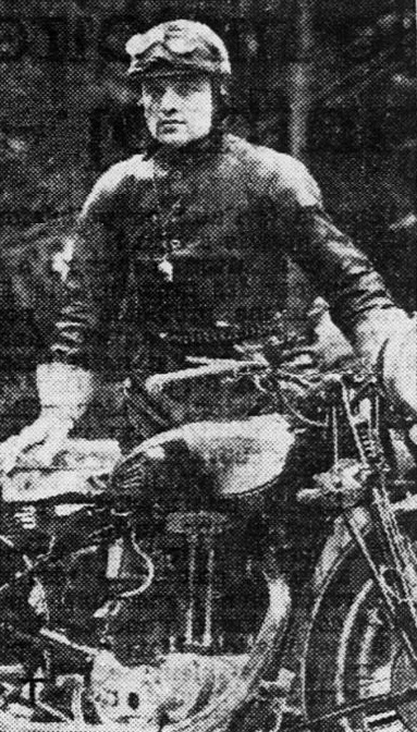 René Boura sur Motobécane S5CGS 500ccm avant le départ du Bol d'or 1936.